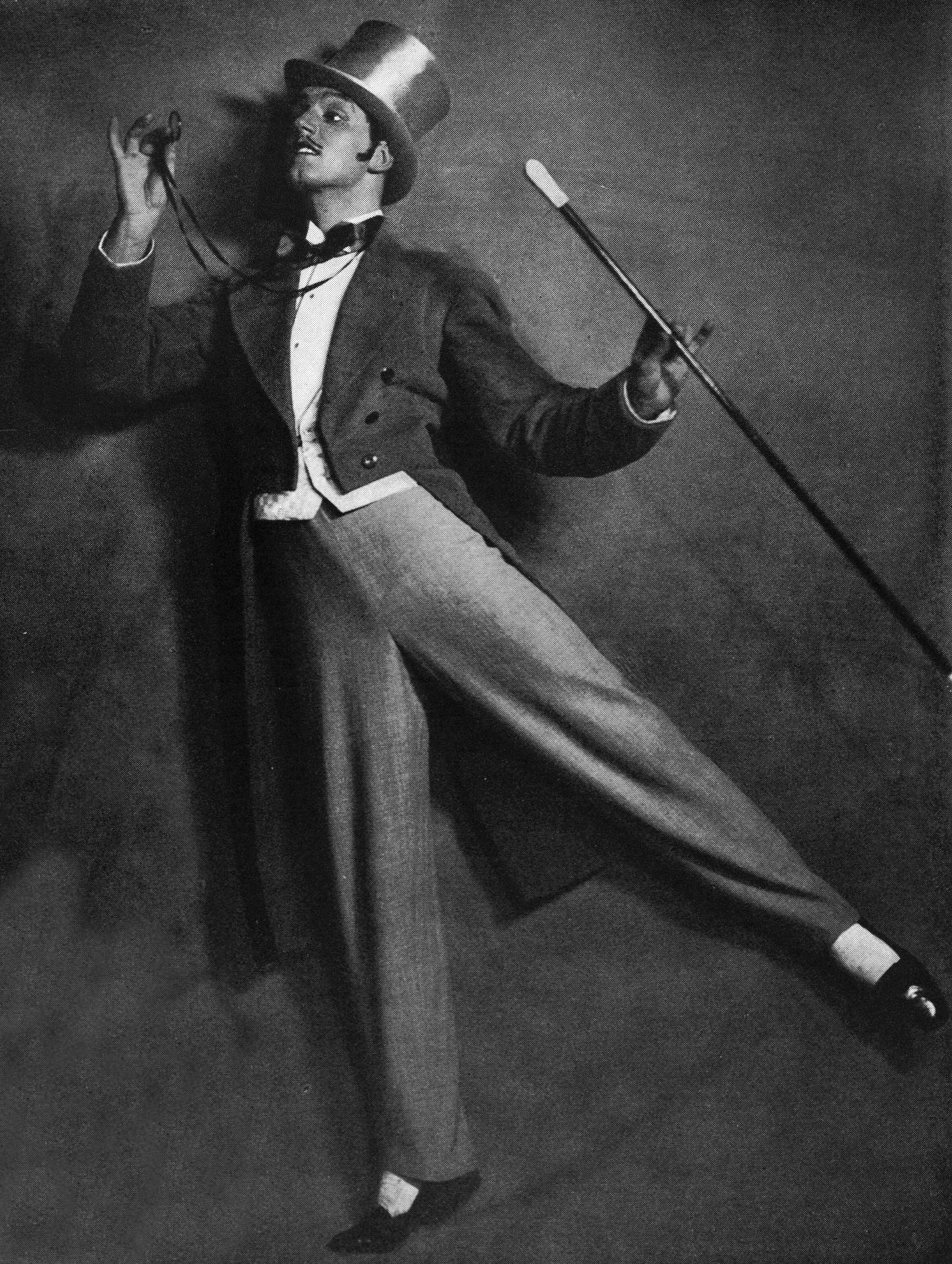 Balettdansören Carl_Gustaf Kruuse i Prima ballerina